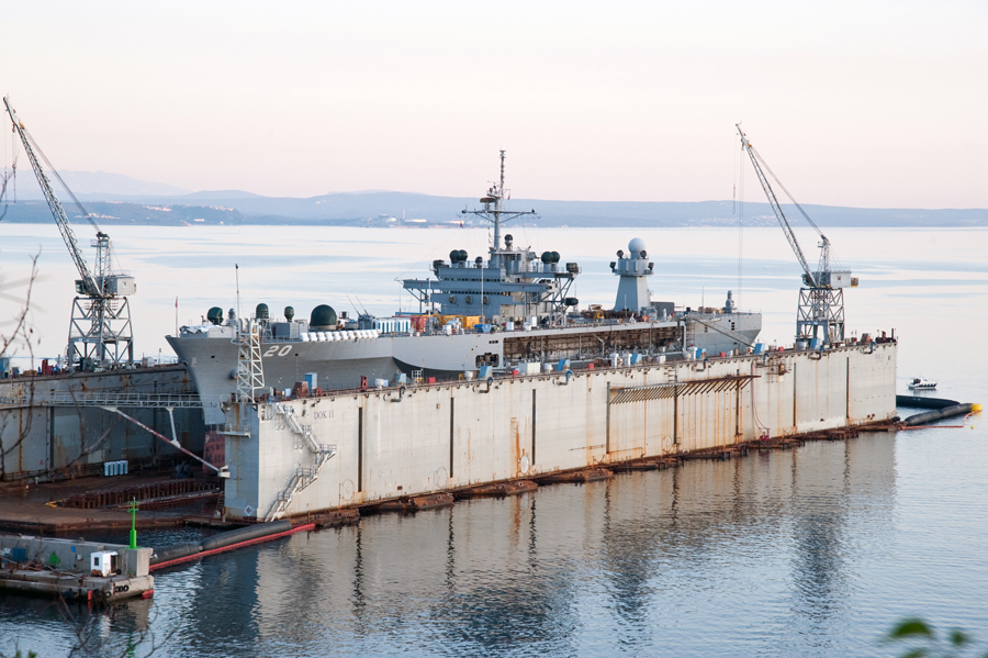 USS Mount Whitney (LCC-20)